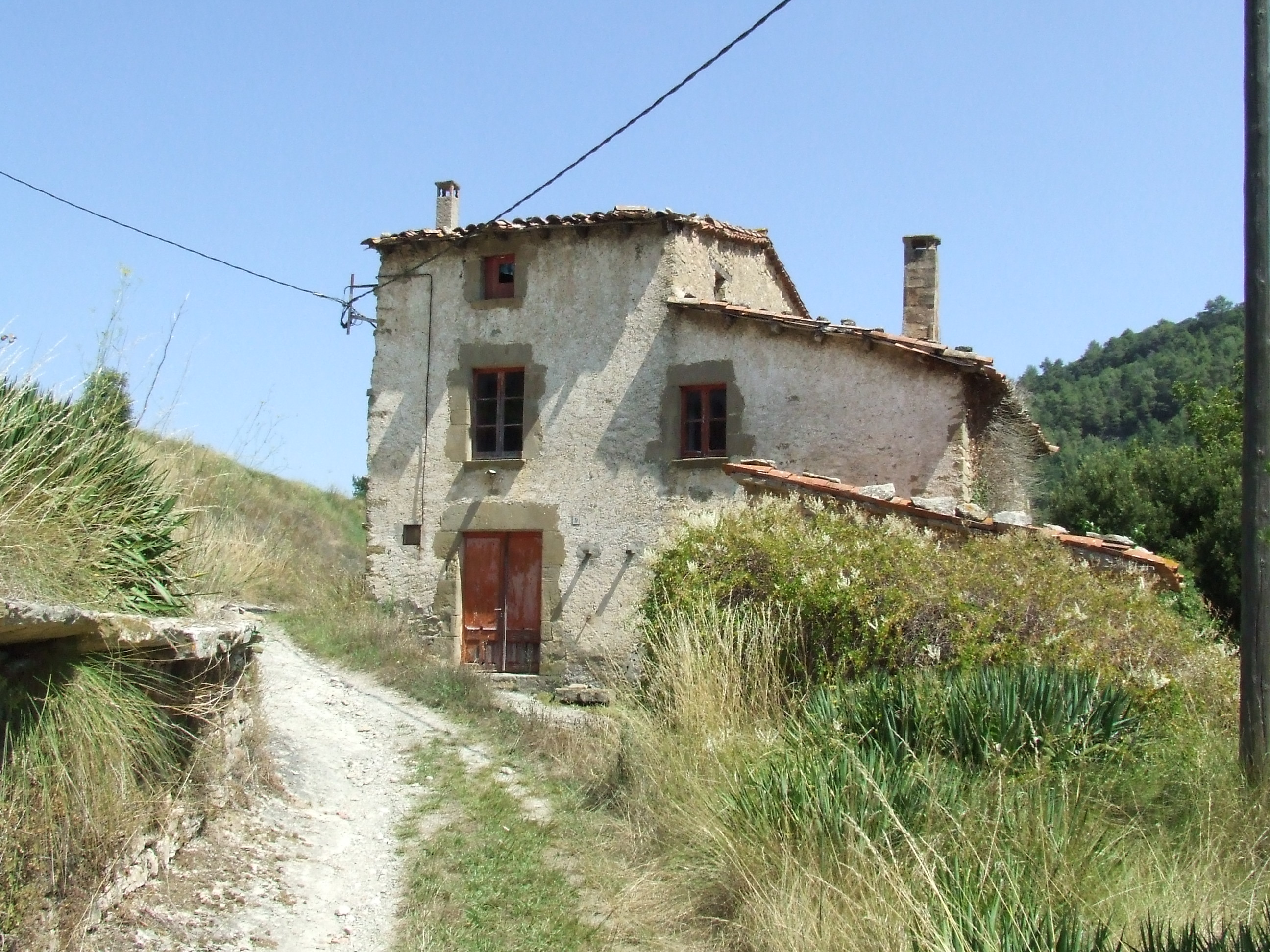 La Vileta (Castellcir, Moianès)